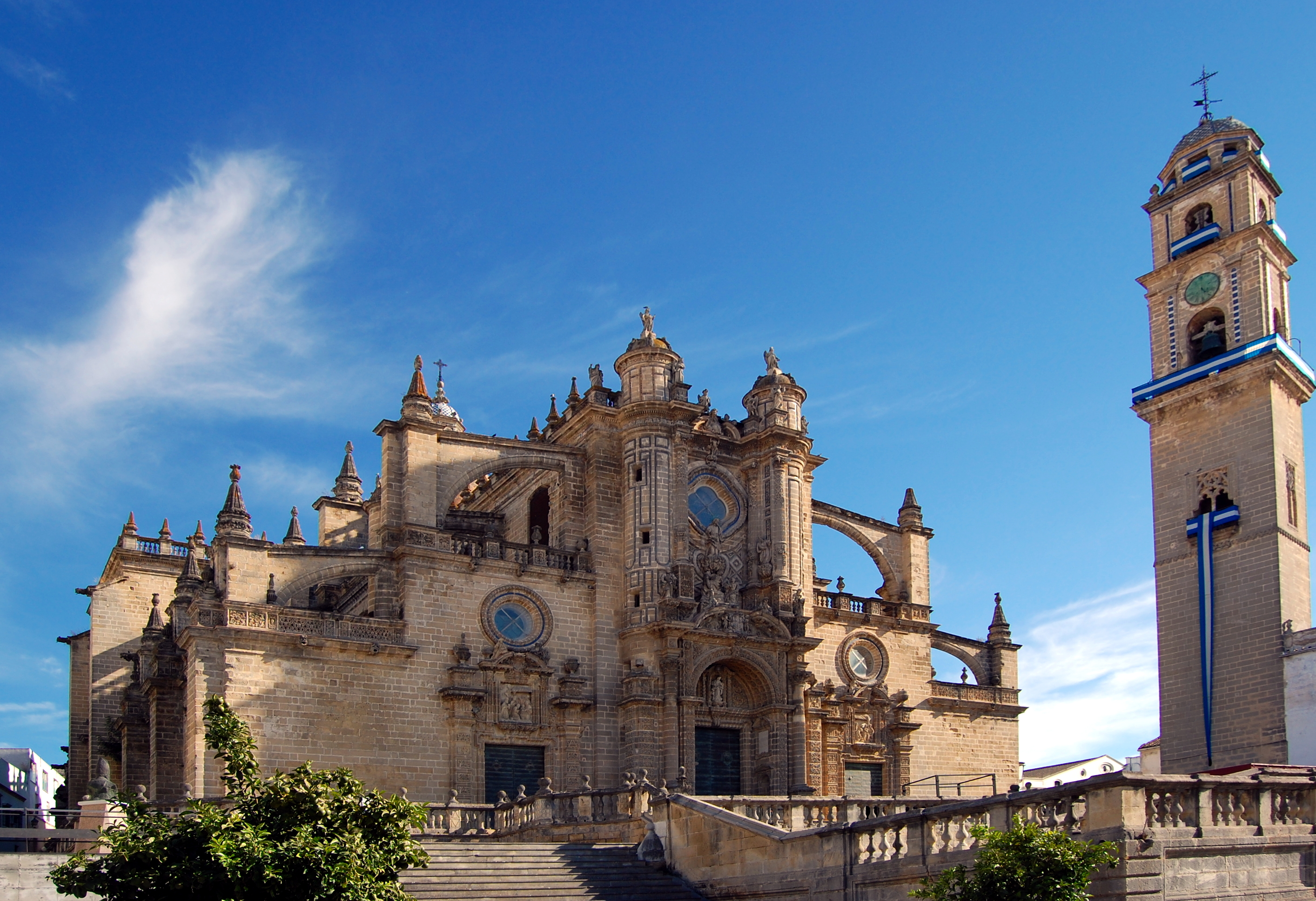 Catedral de Jerez de la Frontera